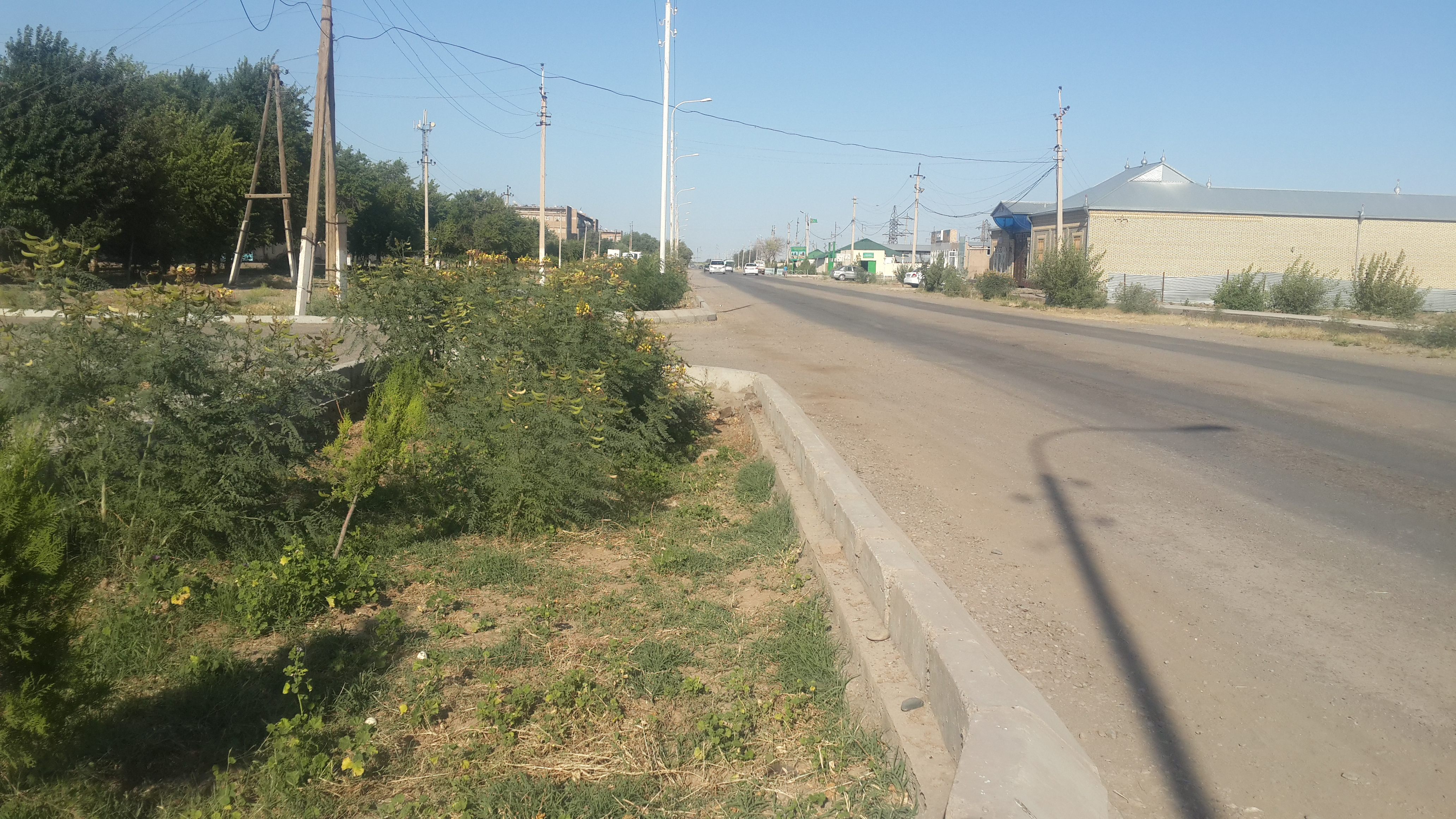 By Eziz Yazgeldiyev